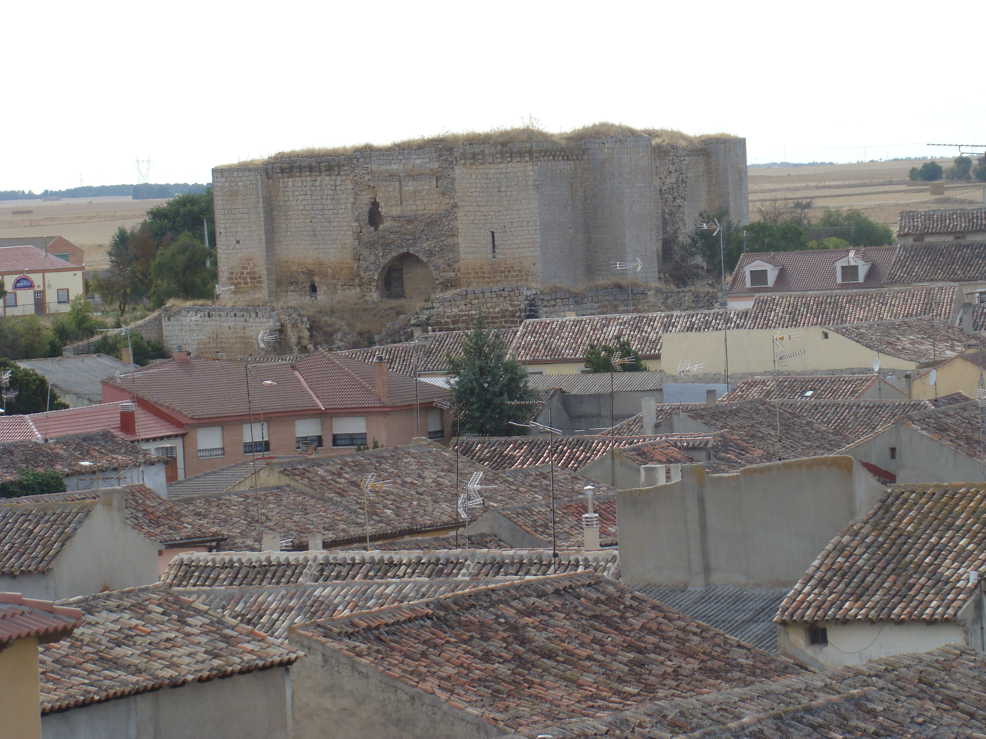 Vista del caserío y castillo de Villalba de los Alcores en la provincia de Valladolid, España.